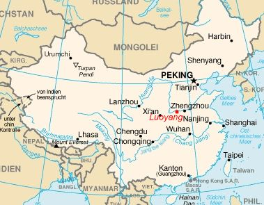 Lage der Stadt Luoyang Format ist verkleinert und ein Punkt hinzugefügt